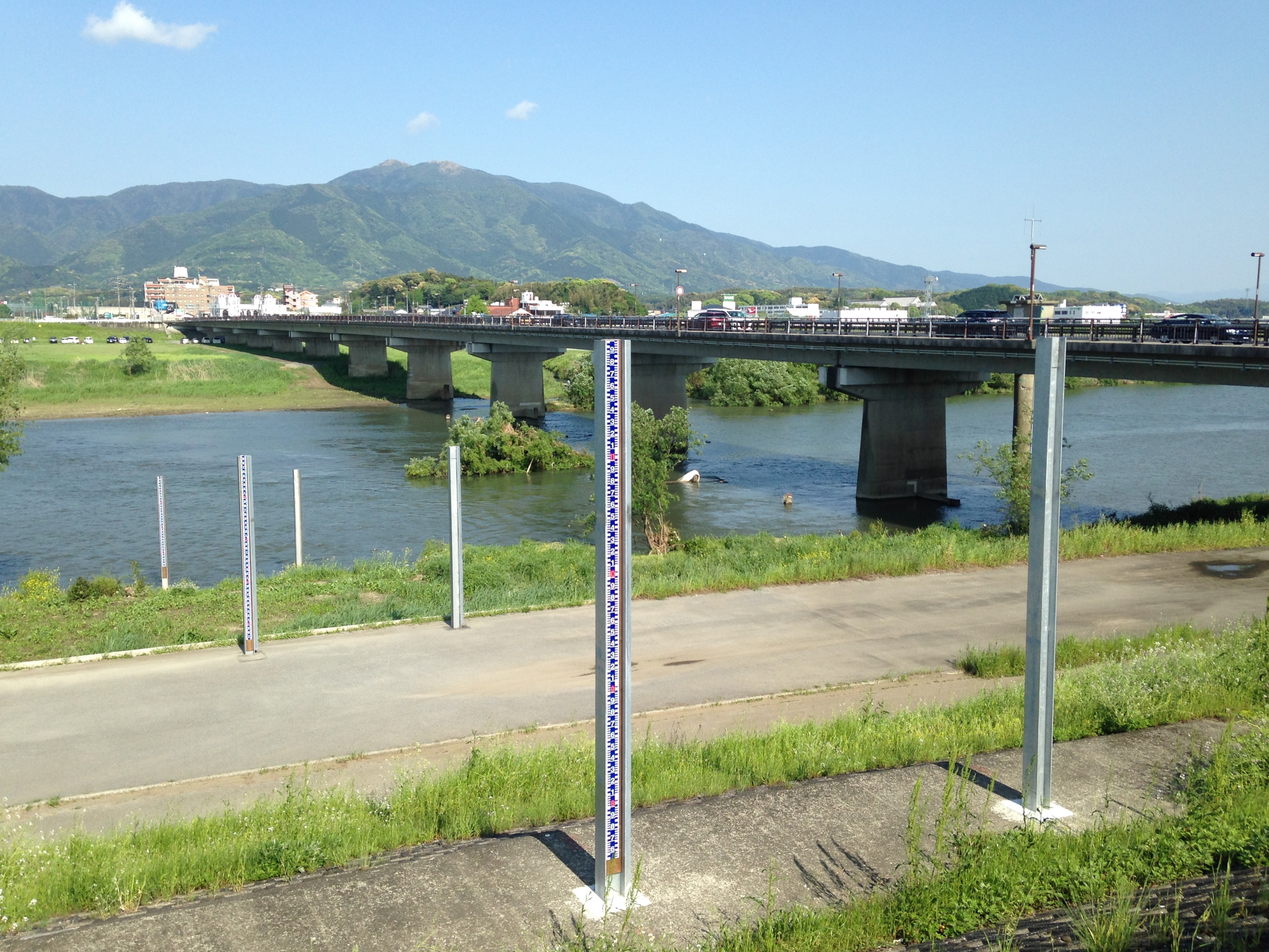 福岡県直方市・日の出大橋の下流側にある量水標